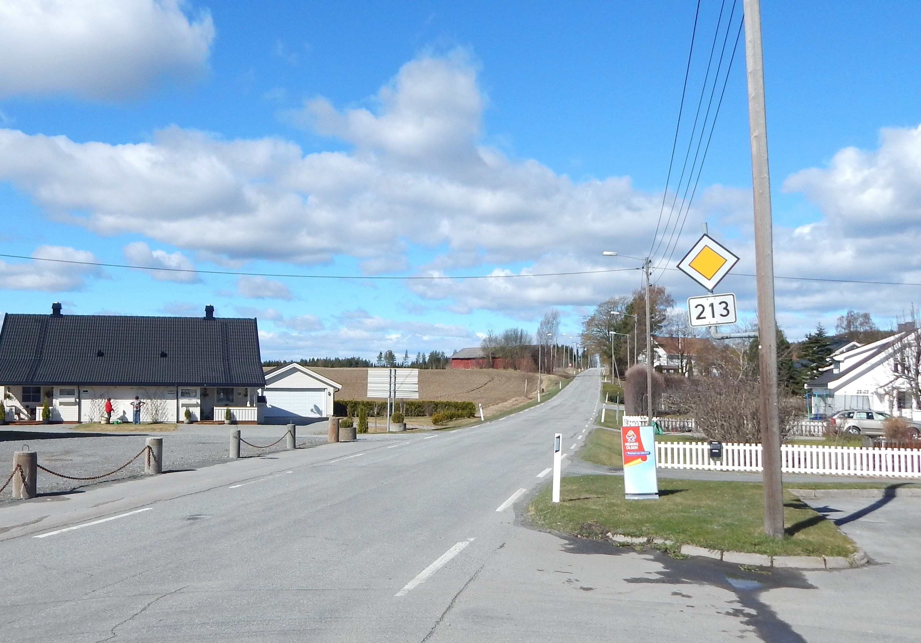 Primær fylkesvei 213 ved Stavsjø